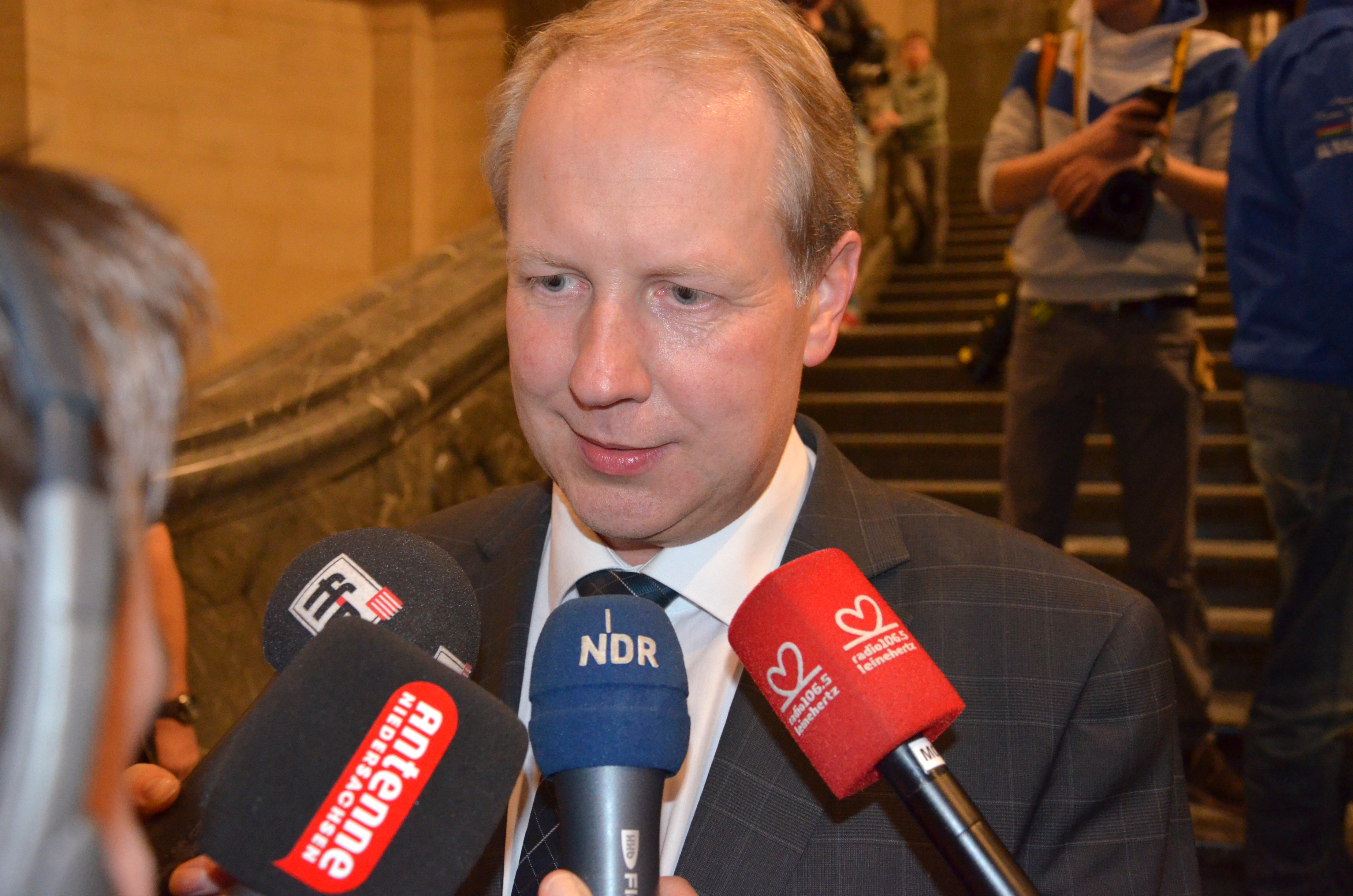 Der zukünftige Oberbürgermeister von Hannover Stefan Schostok (SPD), hier im Neuen Rathaus der niedersächsischen Landeshauptstadt im Interview zunächst mit radio ffn, Antenne Niedersachsen, dem NDR und Radio Leinehertz 106.5 ...